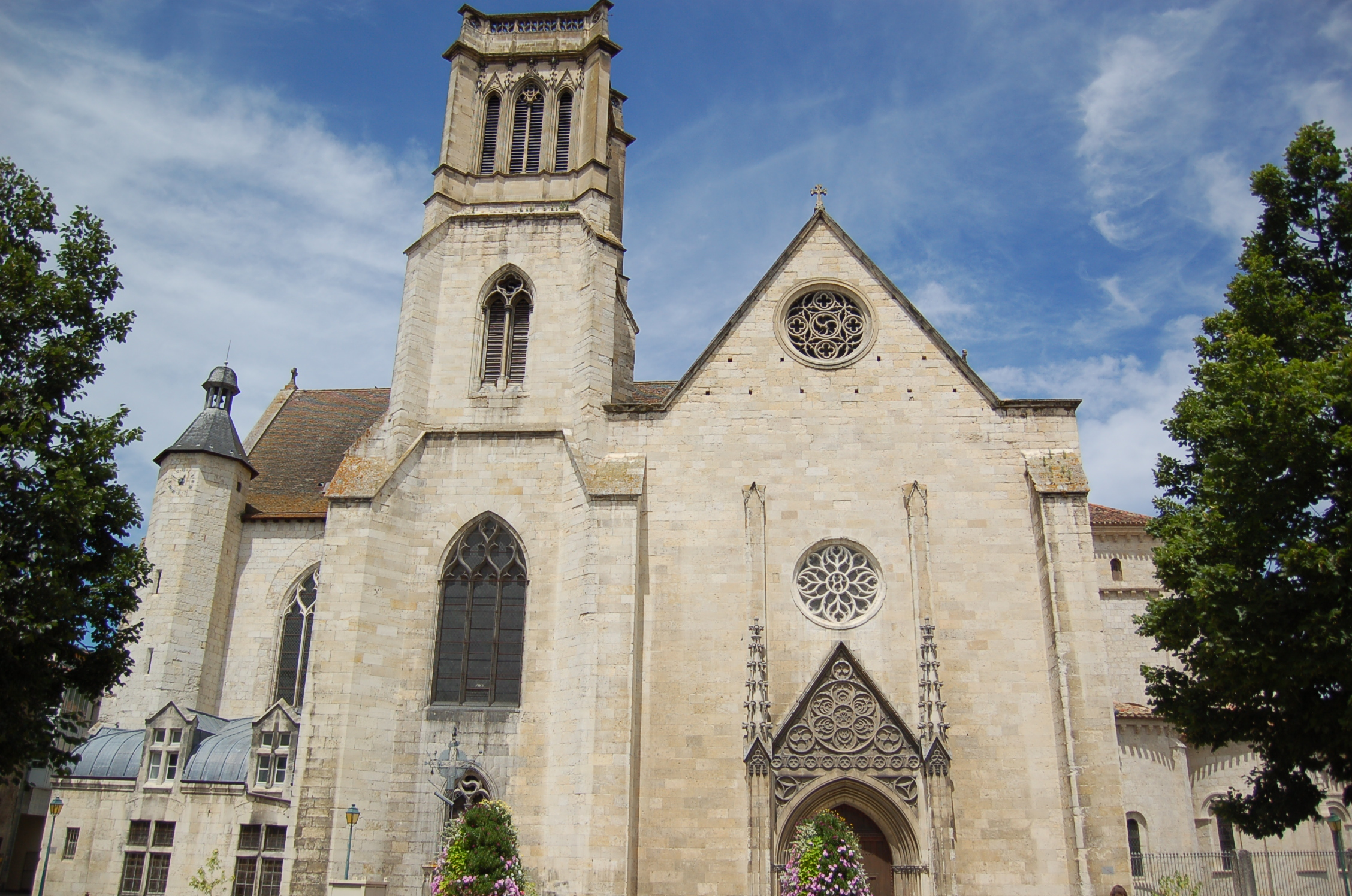 Cathédrale Saint-Caprais d'Agen